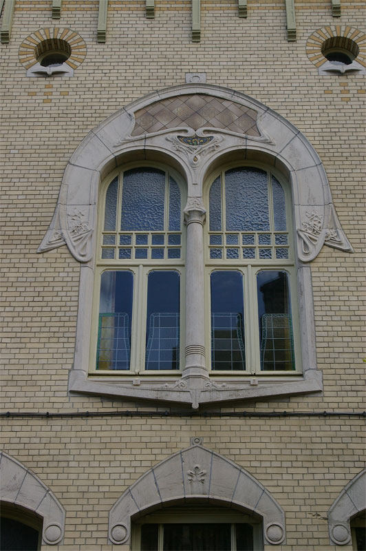 Cogels-Osylei 55, Zurenborg area of Antwerp. "De Morgenster". Date: 1904. Architect: Joseph Bascourt